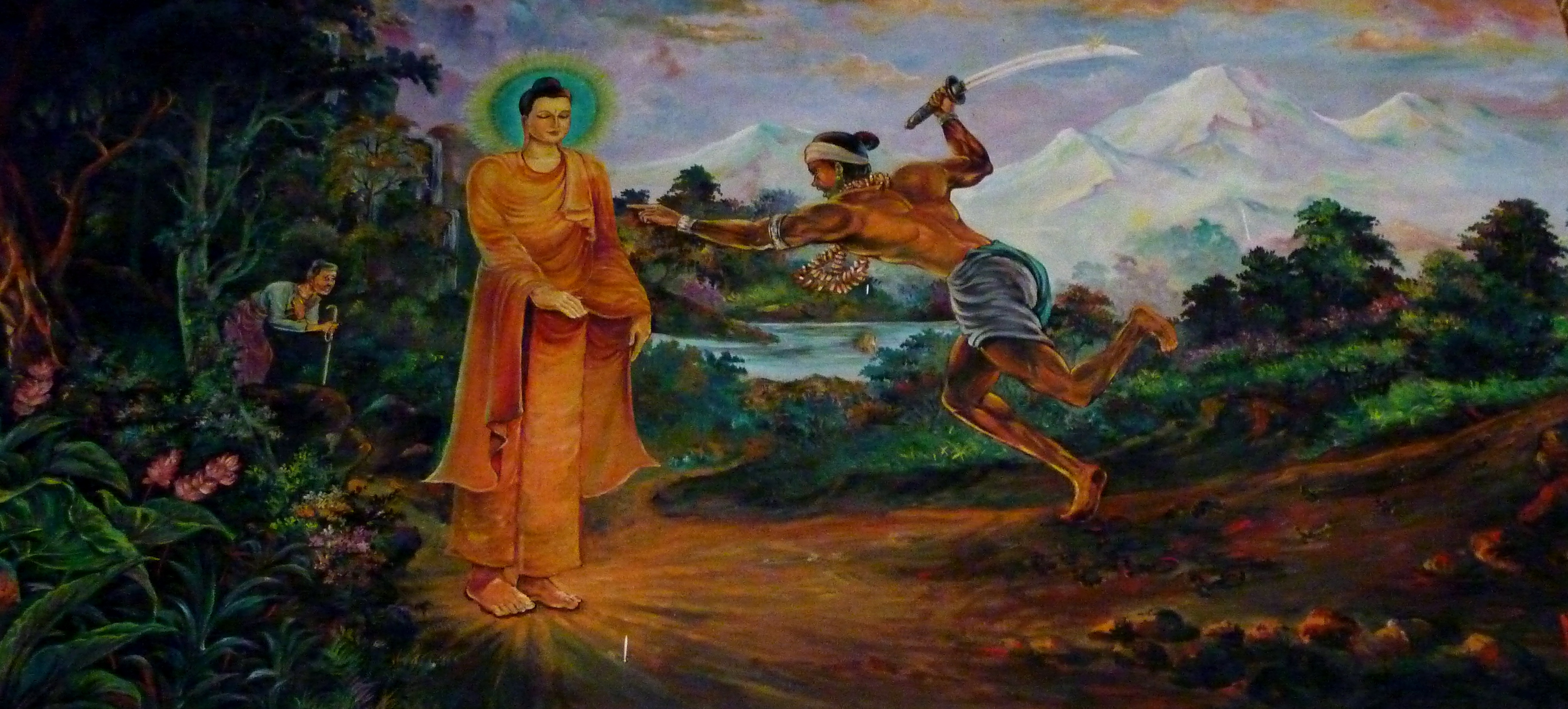 073 The Defeat of Angulimala, at Wat Olak Madu, Kedah